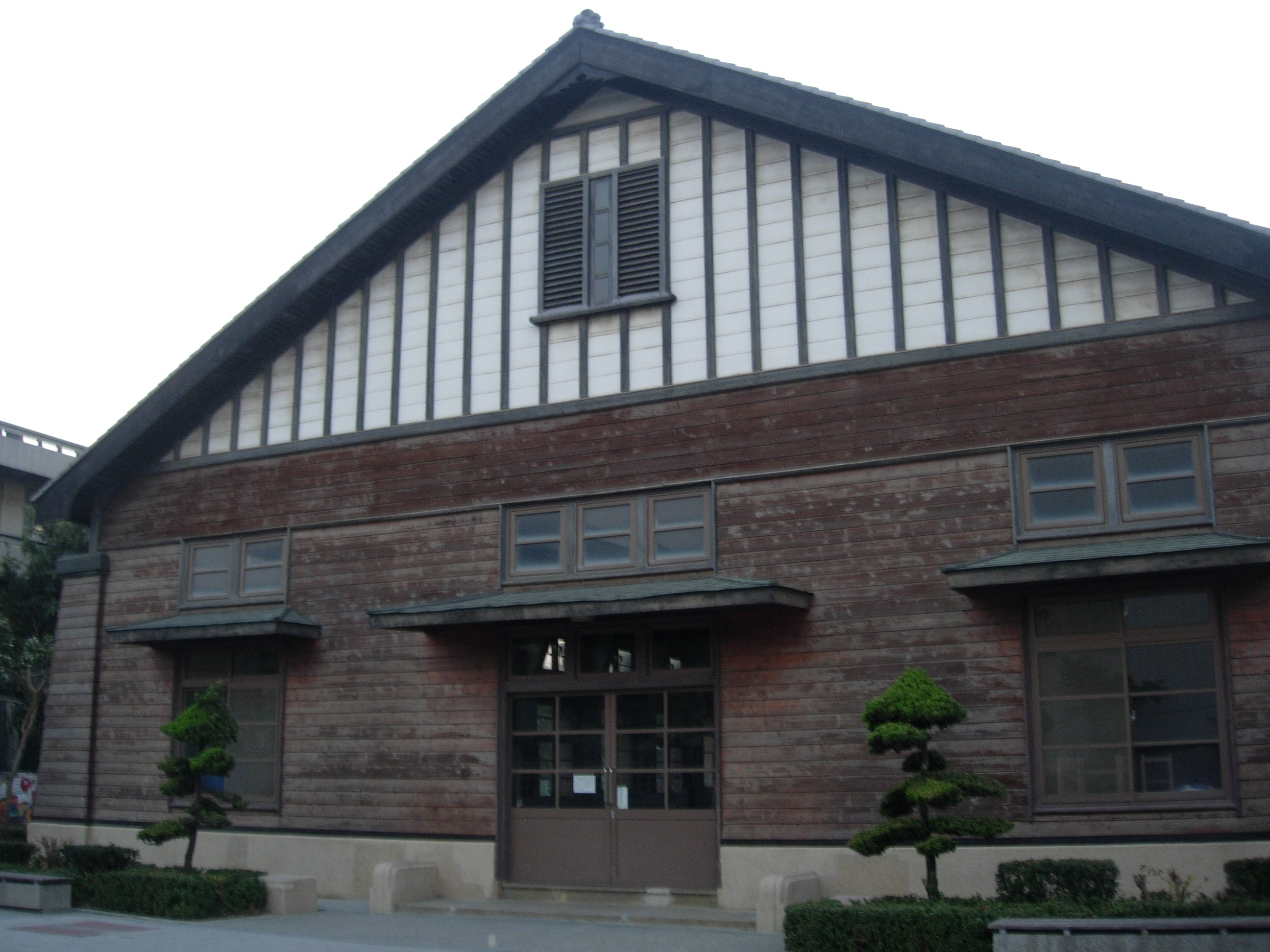 中文（台灣）: 二林公學校禮堂正面